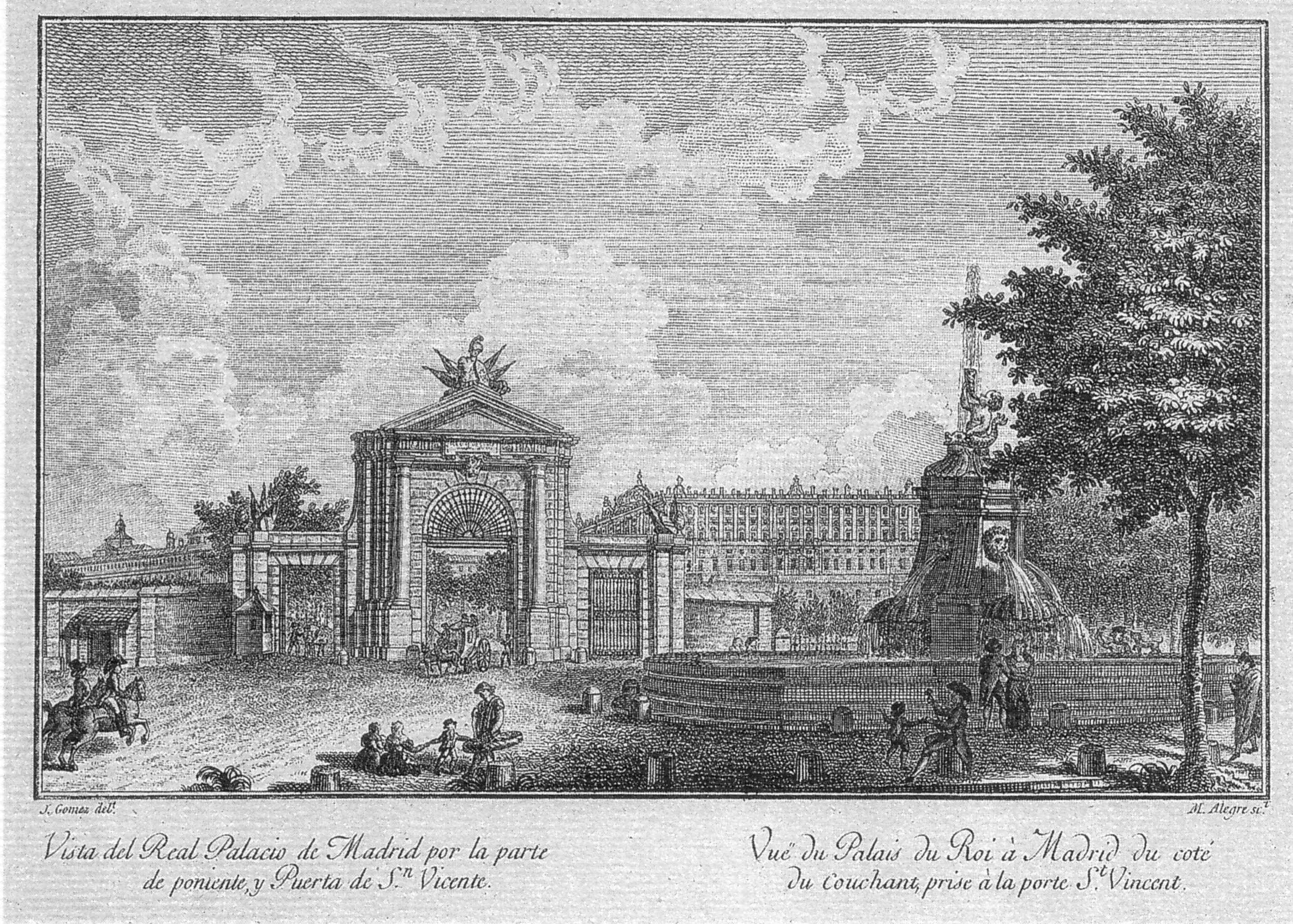 "J. Gomez del.t M. Alegre sc.t / Vista del Real Palacio de Madrid por la parte / de poniente, y Puerta de S.n Vicente./ Vue du Palais du Roi à Madrid du coté / du couchant, prise à la porte S.t Vicent." Cobre, talla dulce (15 x 21,3 cm.)